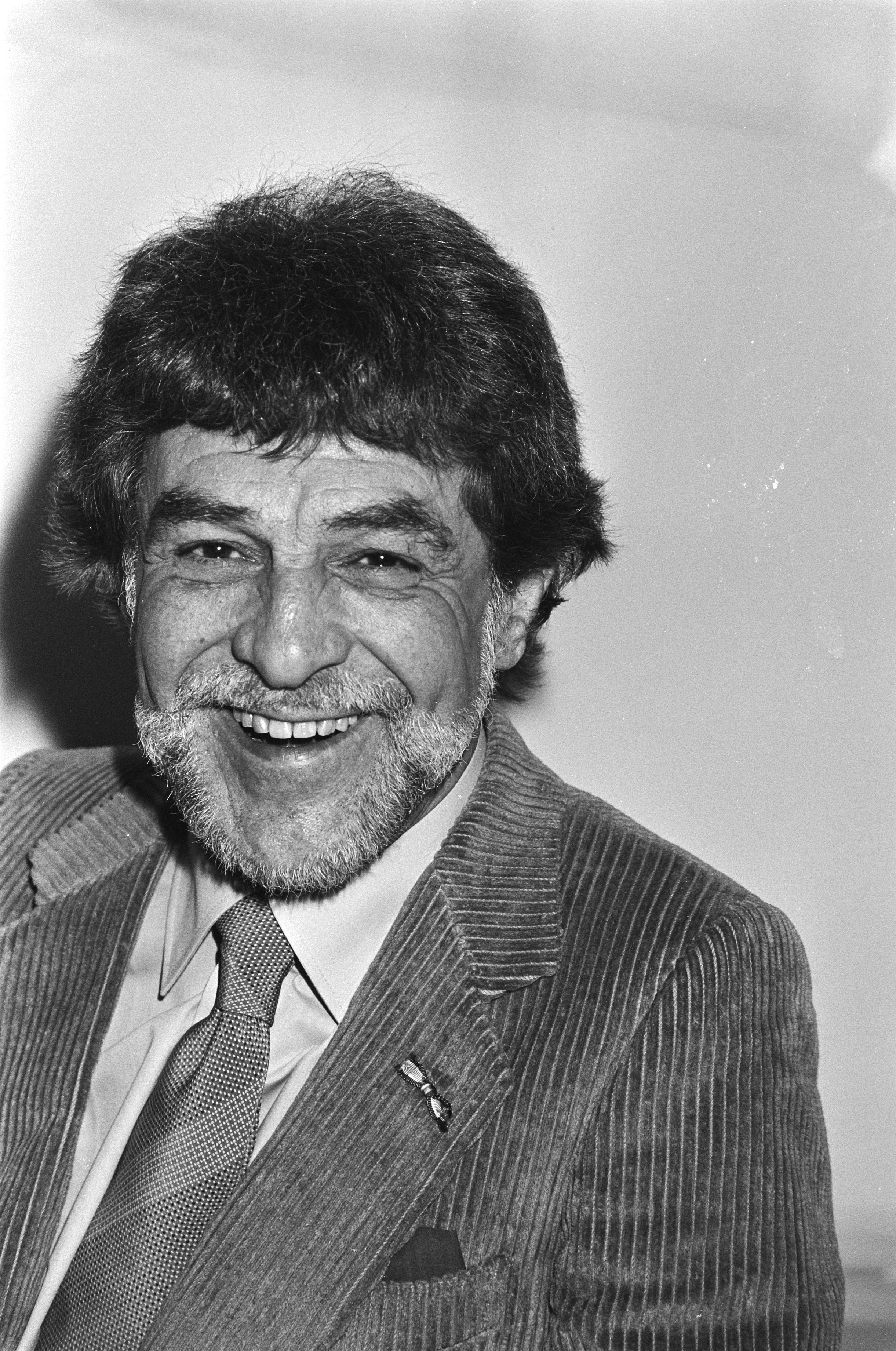 Collectie / Archief : Fotocollectie Anefo Reportage / Serie : [ onbekend ] Beschrijving : Presentatie boek "Brieven aan jou" van Wim Ibo ; Wim Ibo Annotatie : Locatie Stadsschouwburg Amsterdam gelijktijdig met zijn 62ste verjaardag en 40-jarig jubileum als cabaretier en "cabaretoloog" Datum : 10 april 1980 Locatie : Amsterdam, Noord-Holland Trefwoorden : cabaretiers, portretten, schrijvers Persoonsnaam : Ibo, Wim Fotograaf : Dijk, Hans van / Anefo Auteursrechthebbende : Nationaal Archief Materiaalsoort : Negatief (zwart/wit) Nummer archiefinventaris : bekijk toegang 2.24.01.05 Bestanddeelnummer : 930-7648